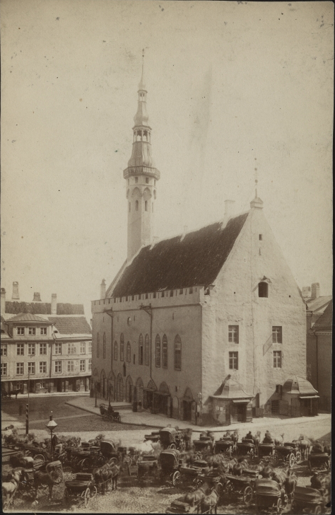 Tallinna raekoda; vaadatuna Voorimehe ja Kullassepa tänava nurgalt. (AM 8544 34 F 10170)